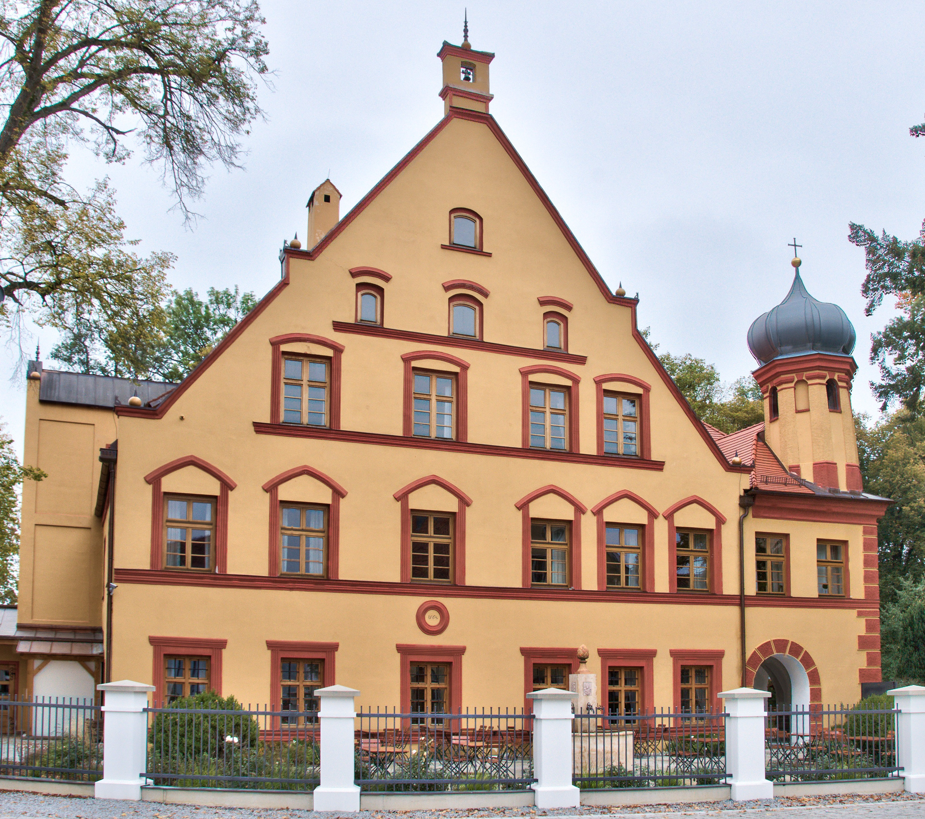 Ehemaliges Hofmarkschloss, zweigeschossige und giebelständige Renaissance-Anlage mit steilem Satteldach, Fassadengliederung mit Fensterumrahmungen und Gesimsen, 1560/62This is a photograph of an architectural monument.